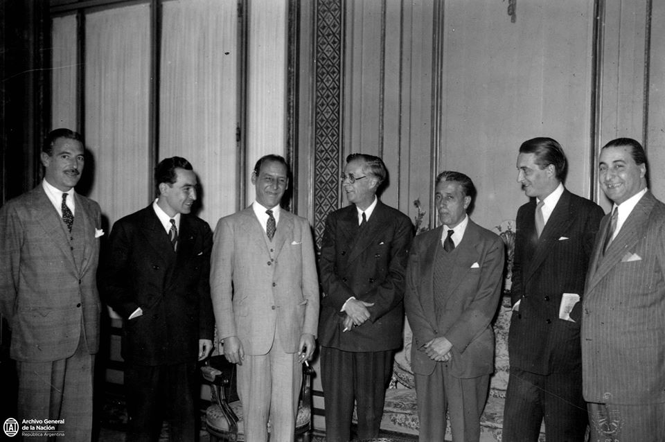 En la cancillería durante la entrevista del ministro de Relaciones Exteriores y Culto Juan Atilio Bramuglia con el Presidente de la Unesco, Julian Huxley. AGN_DDF/ Caja:3019, inv:171234